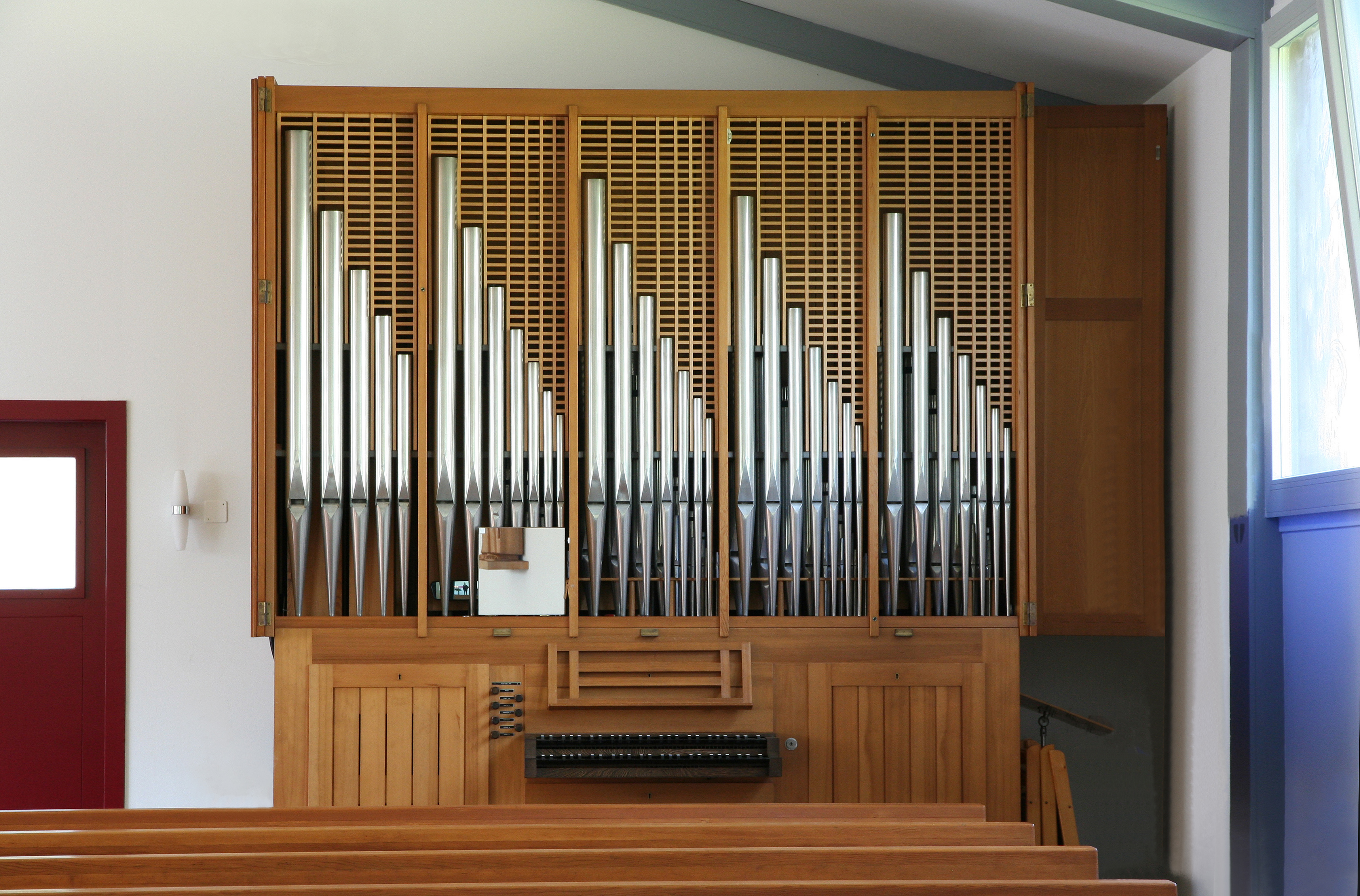 Römisch-katholische Kirche St. Antonius Obfelden, Orgel